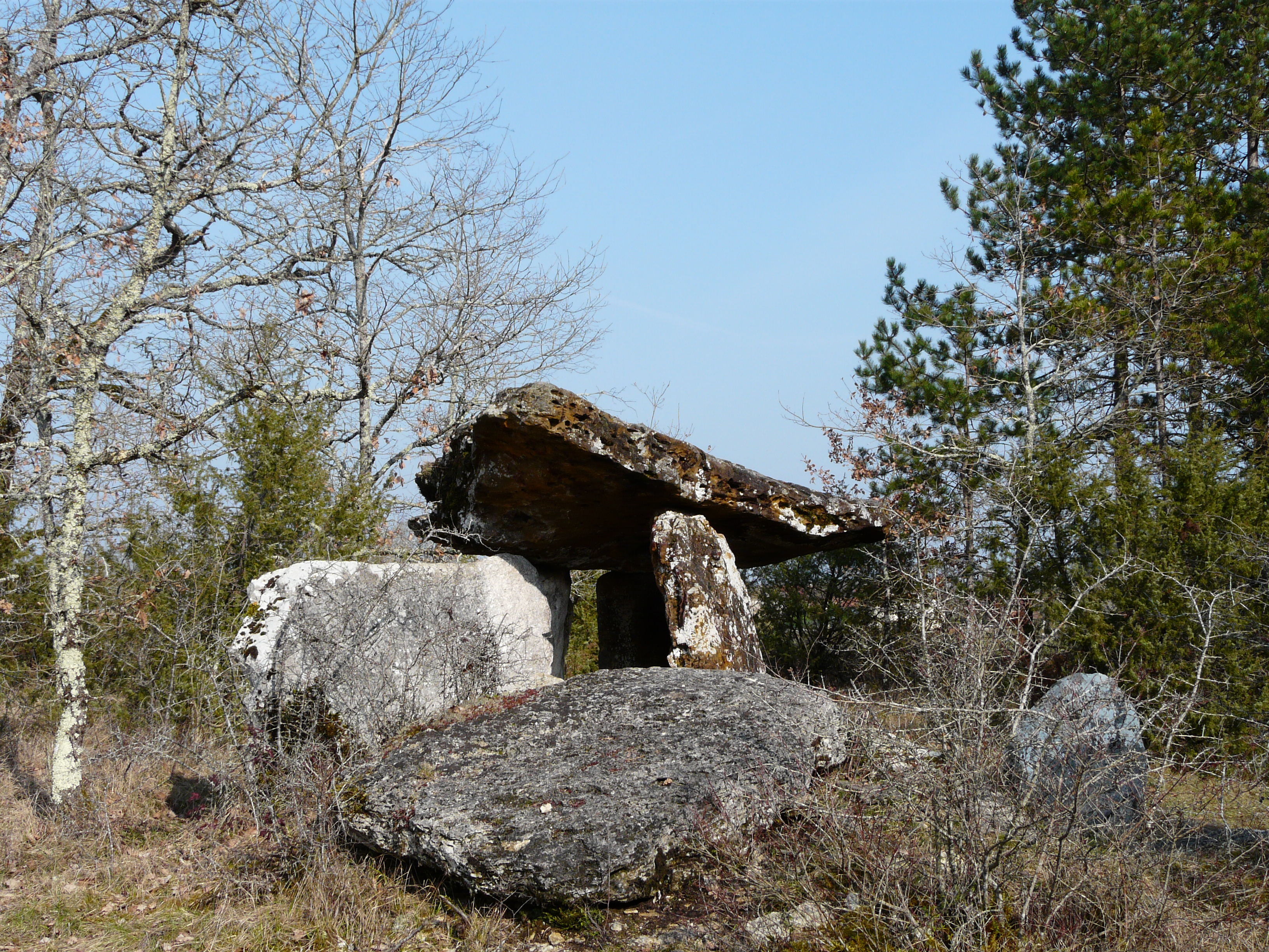 Le dolmen de Peyrelevade, Paussac-et-Saint-Vivien, Dordogne, France.